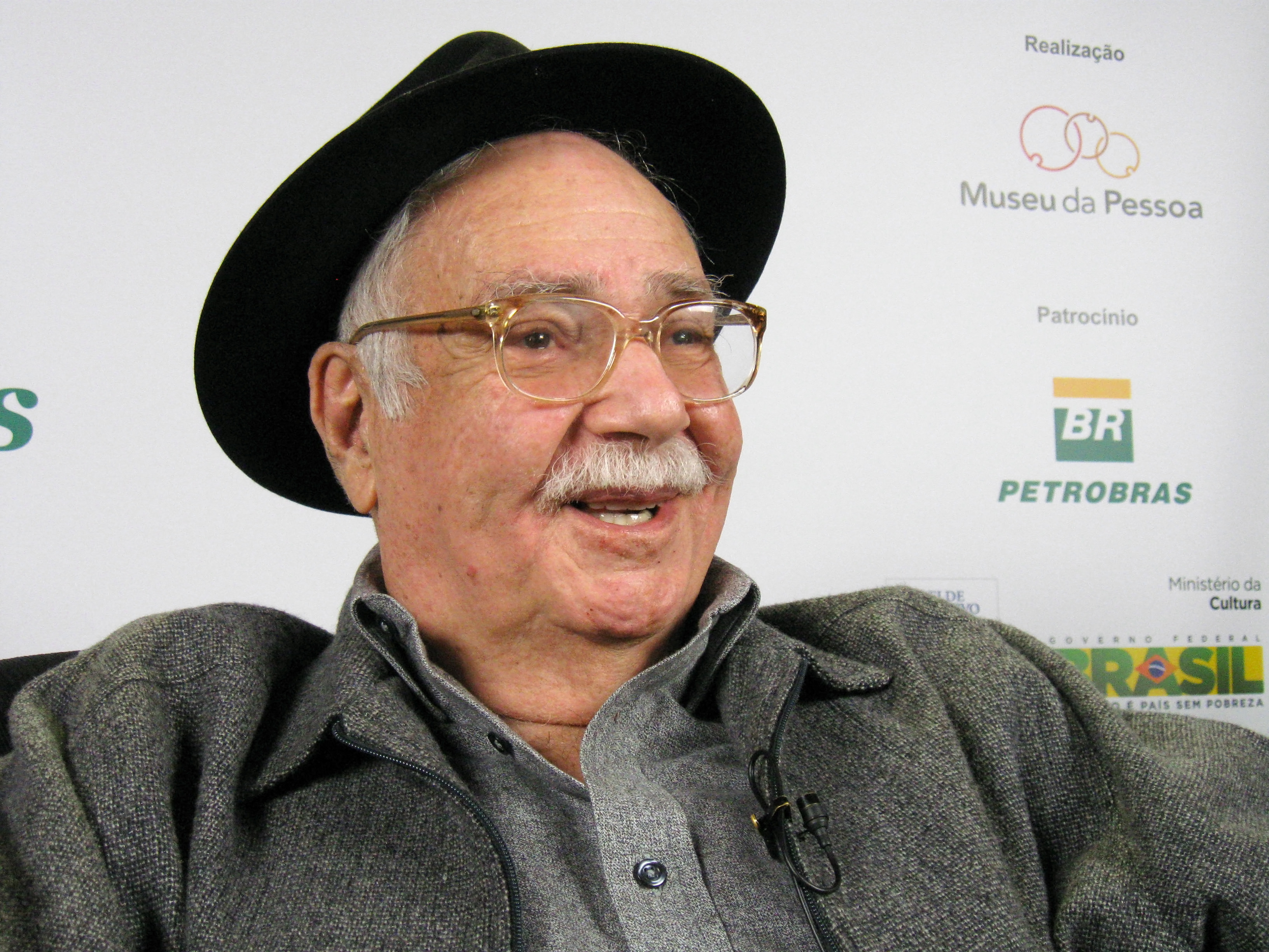 Paulo Vanzolini - mestre da música brasileira e dos mais respeitados cientistas ligados à zoologia no mundo, Paulo Vanzolini é o personagem do Conte Sua História de São Paulo. Ele nasceu em 1924 na Avenida Brigadeiro Luís Antônio, filho de pai engenheiro e professor da Poli-USP e mãe dona de casa. Cresceu entre a Alameda Tietê e a rua Atlântica, nos Jardins, um bairro bem diferente nos anos 30. Morreu em 28 de abril de 2013